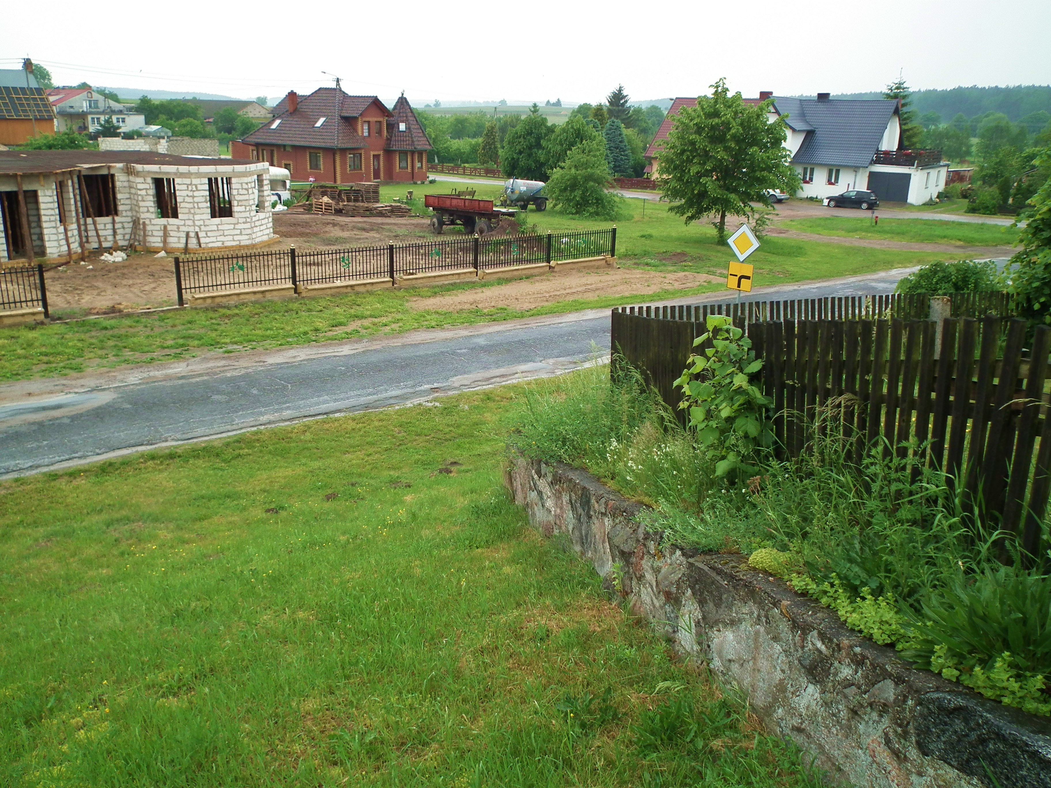 Obkas - widok ogólny.